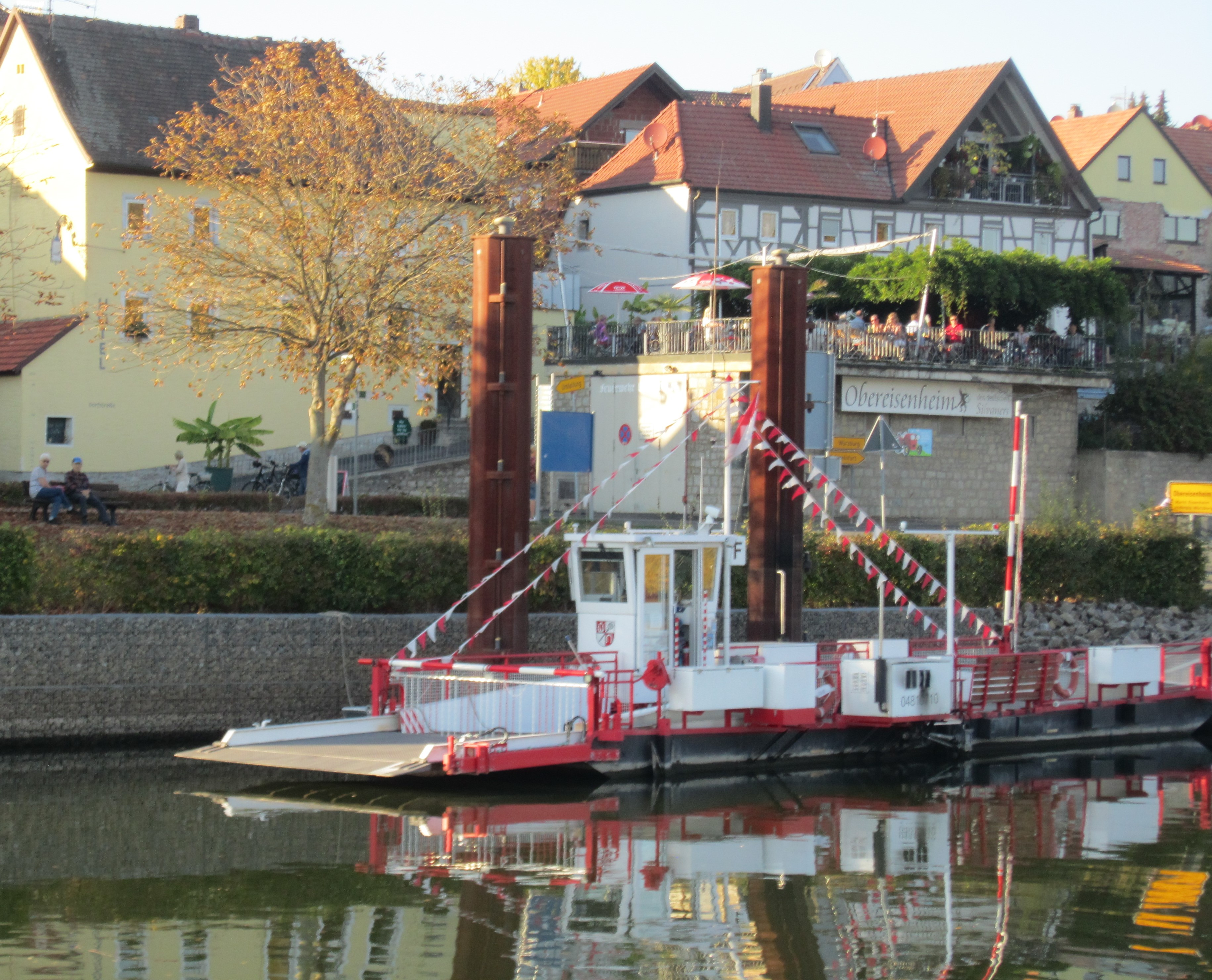 Mainfähre Obereisenheim - Stammheim